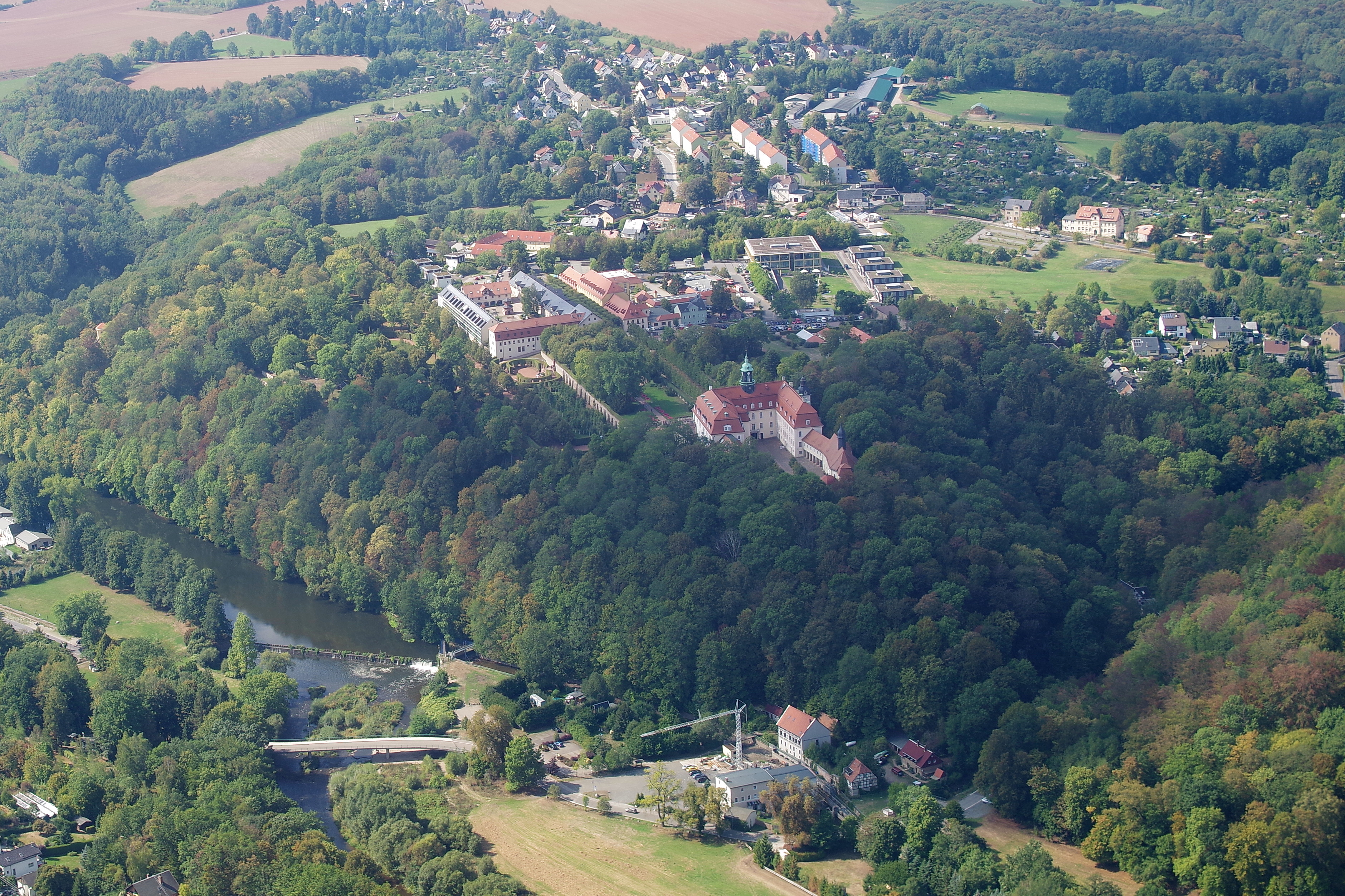 Barockschloss Lichtenwalde